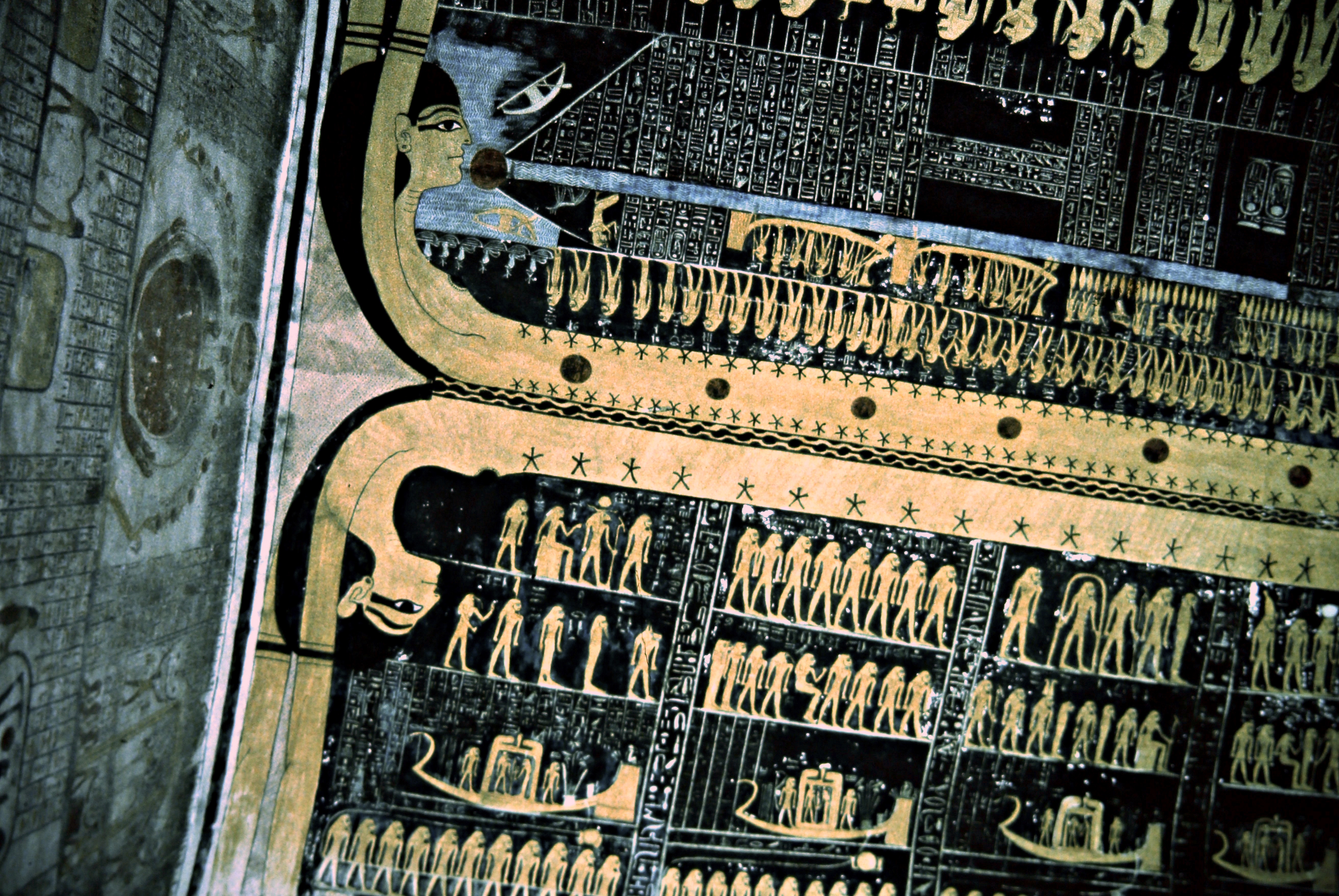 Darstellung der Nut im Grabmal KV9